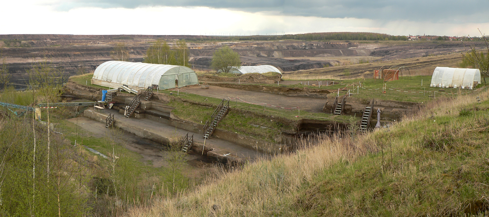 Ausgrabungstelle der Schöninger Speere